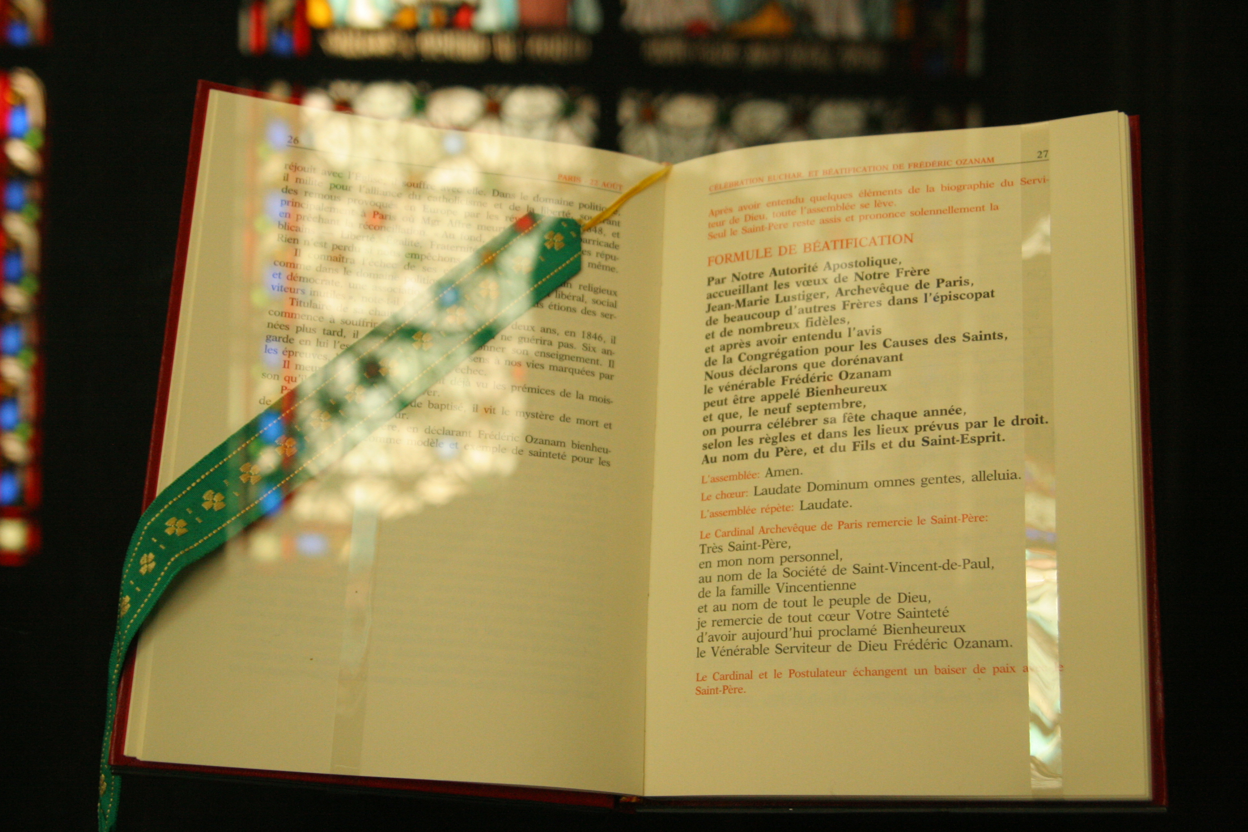 Париж, Франция. Май 2012 Paris, France. May 2012